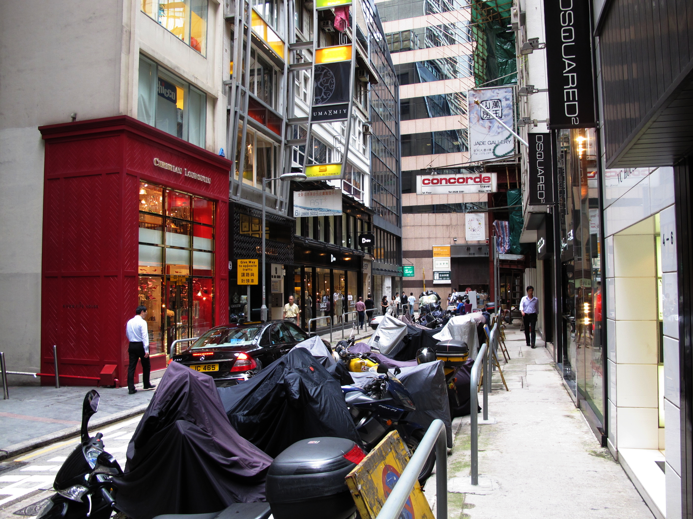 On Lan Street 安蘭街